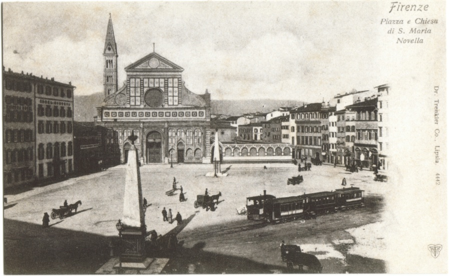 Piazza Santa Maria Novella in Firenze, tram in sosta al capolinea delle linee tranviaria per Prato-Poggio a Caiano e per la Linea delle Cascine